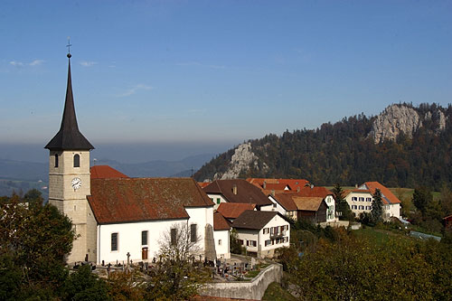 Saint-Brais